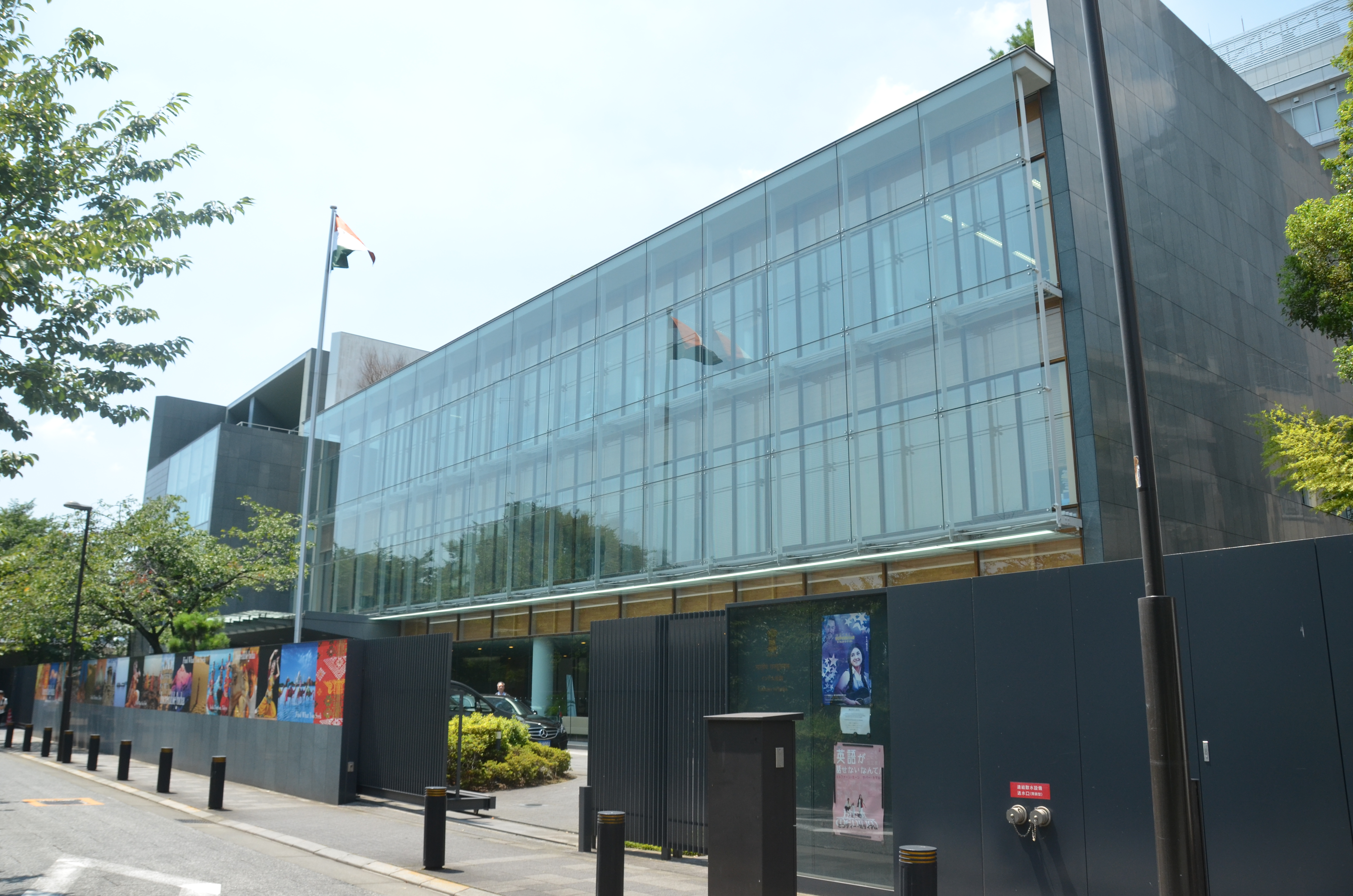 駐日インド大使館、東京都千代田区